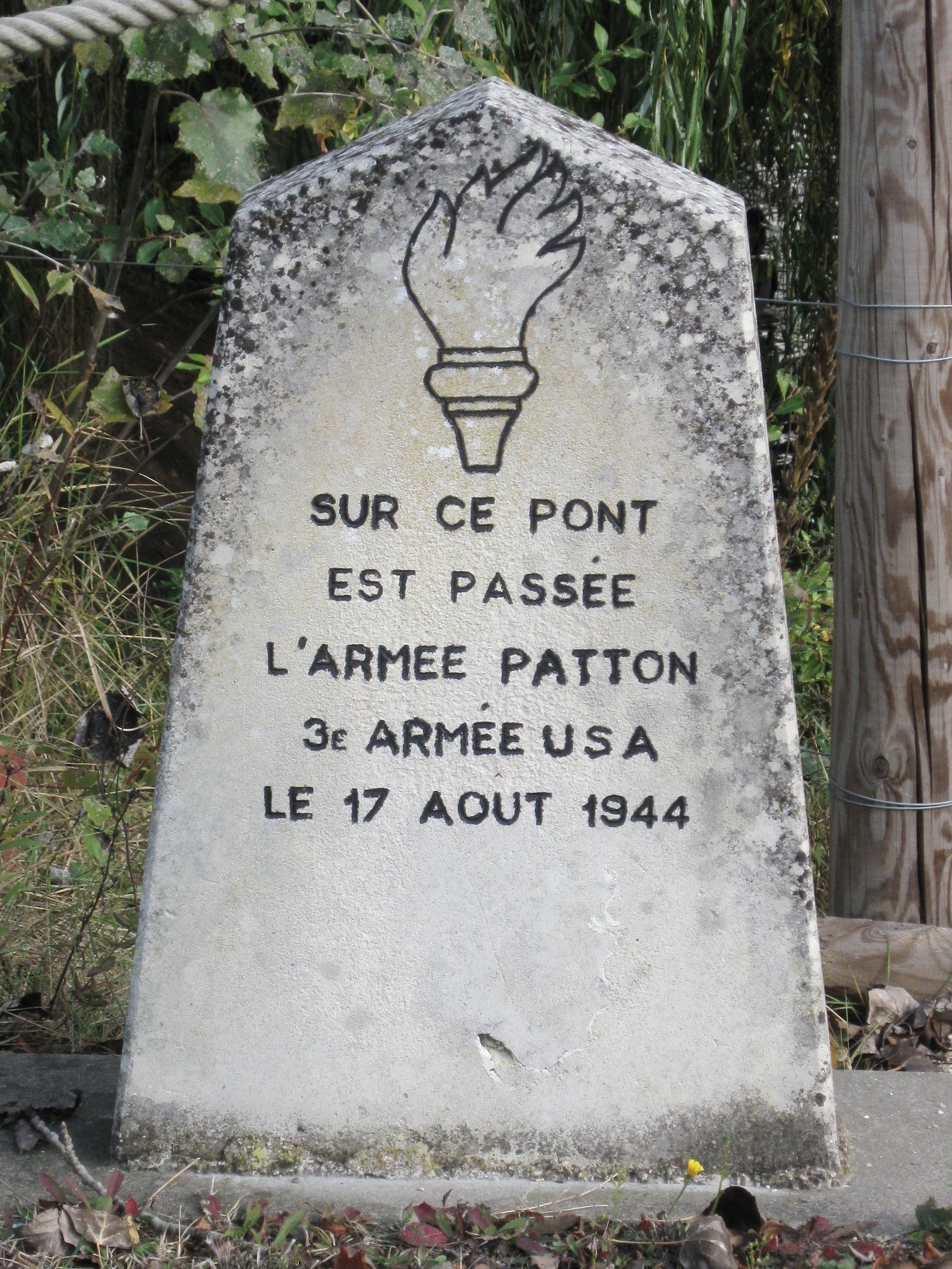 Plaque commémorative du passage de l'armée Patton le 17 août 1944, pont sur la Bionne, Boigny-sur-Bionne, Loiret, France